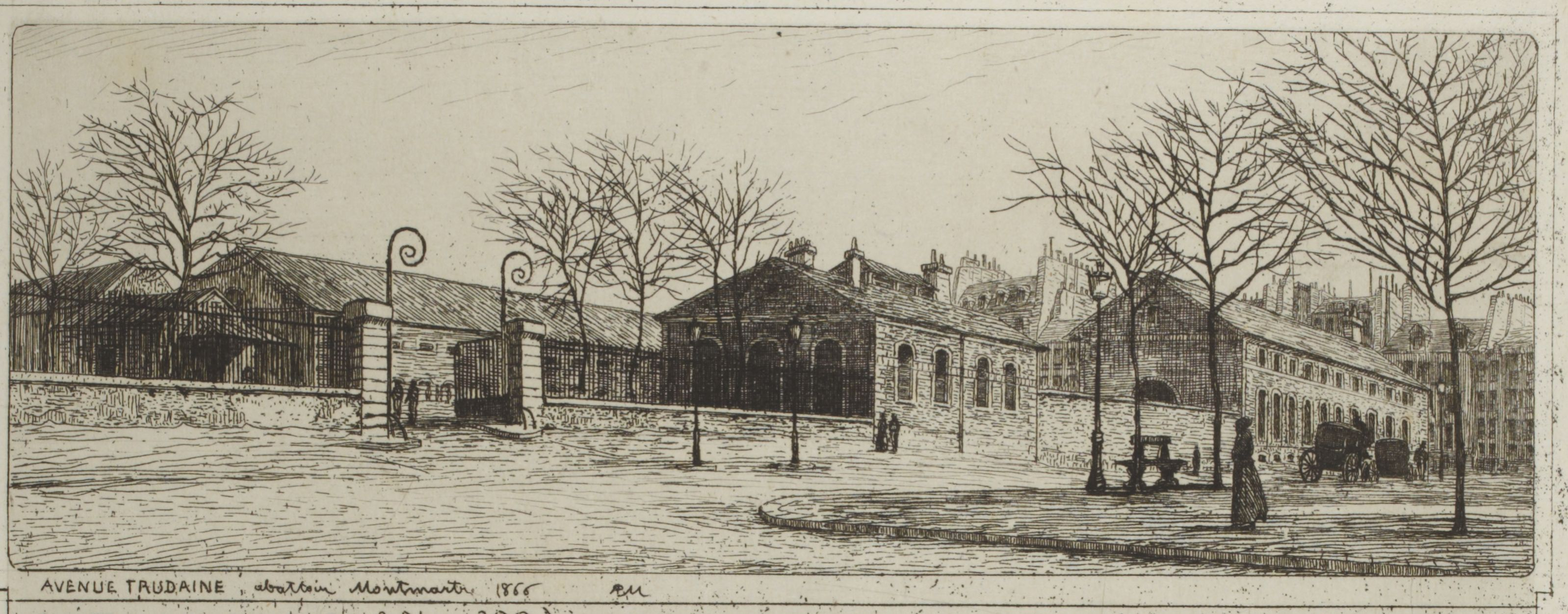 Eau-forte d'Adolphe Martial Potémont, dit A.P. Martial, représentant l'entrée des abattoirs de Montmartre sur l'avenue Trudaine, à Paris. Signé "APM" à droite du titre.